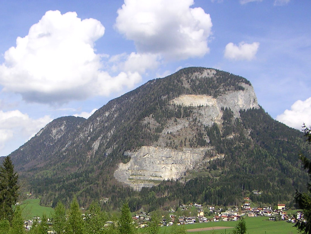 Der große Pölven im Vordergrund und der kleine Pölven im Hintergrund, gesehen von Bad Häring in Tirol, selbst photographiert am 1. Mai 2005